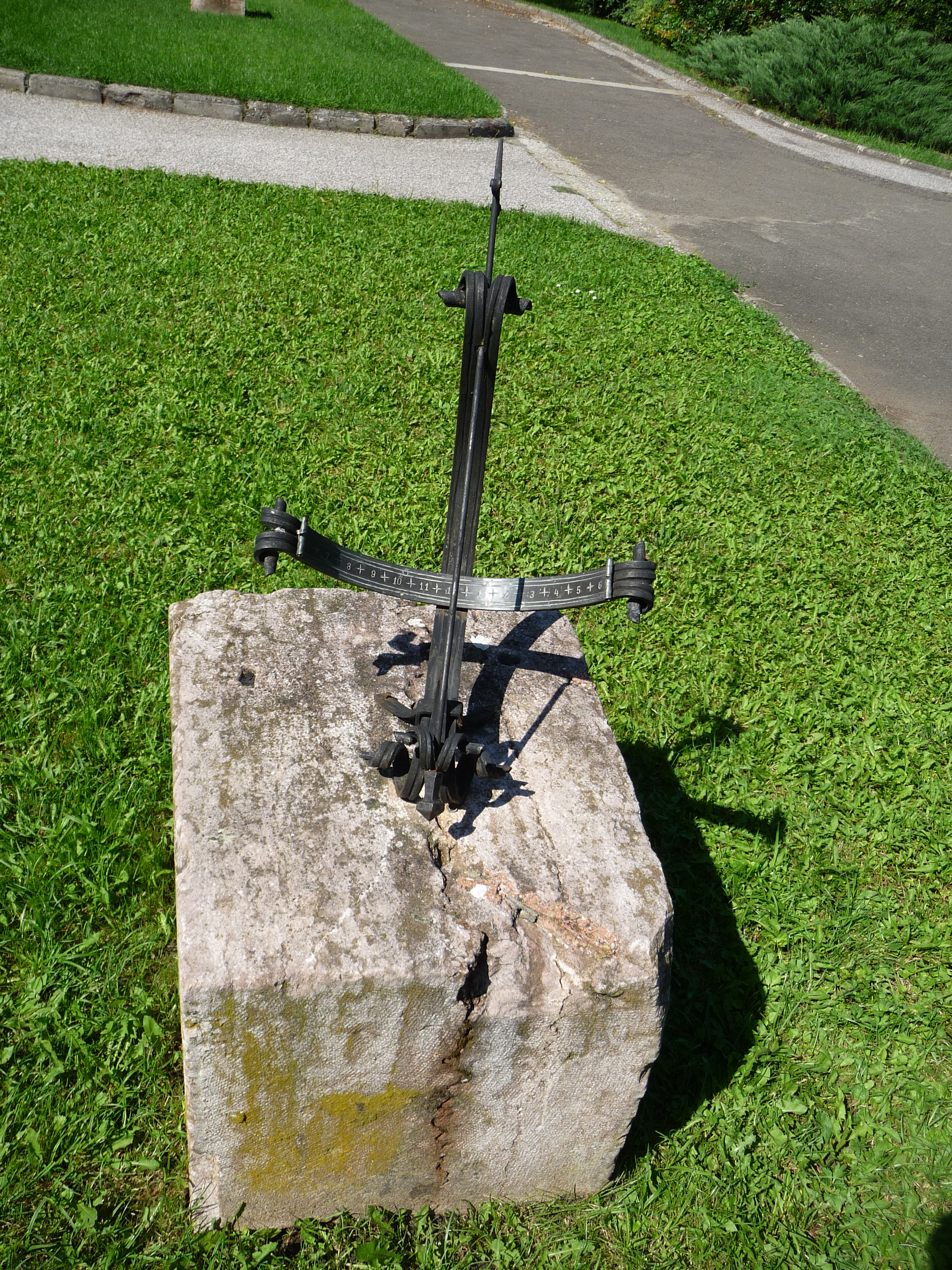 Napóra Szirákon